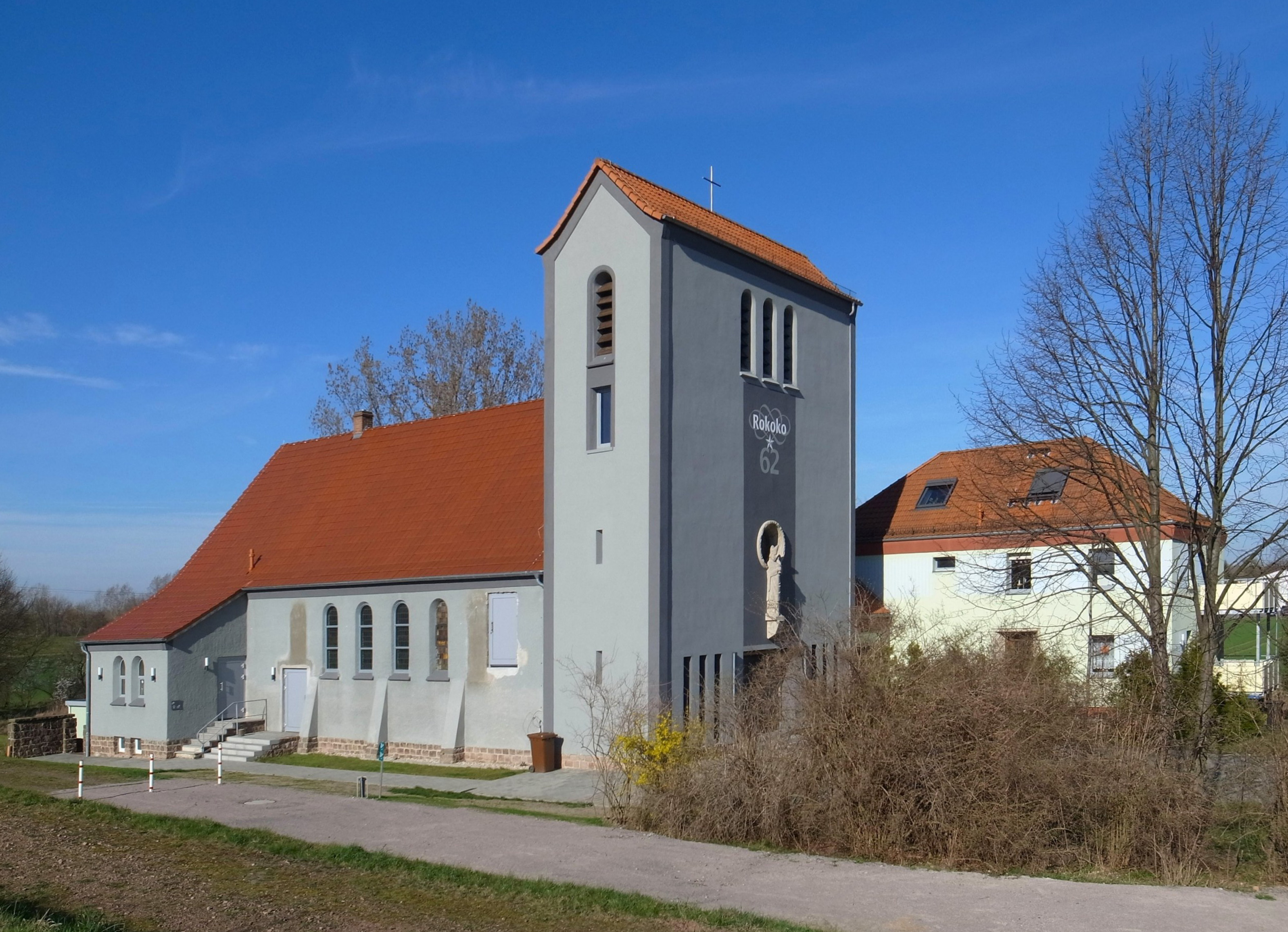 Jeßnitz,ehemalige katholische Kirche St. Norbert. Die Kirche wurde nach schweren Schäden durch das Hochwasser von 2002 geschlossen und verkauft. Wird heute als Veranstaltungsort genutzt.